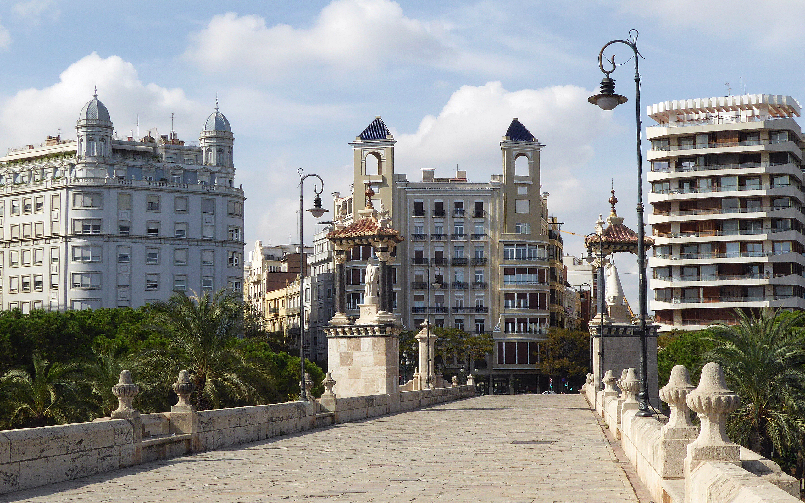 Pont de la Mar, eine Mehrfeld-Quadersteinbrücke über ein kleines künstliches Gewässer und einen Palmenpark inmitten von Valencia Spanien Foto Wolfgang Pehlemann P1140511